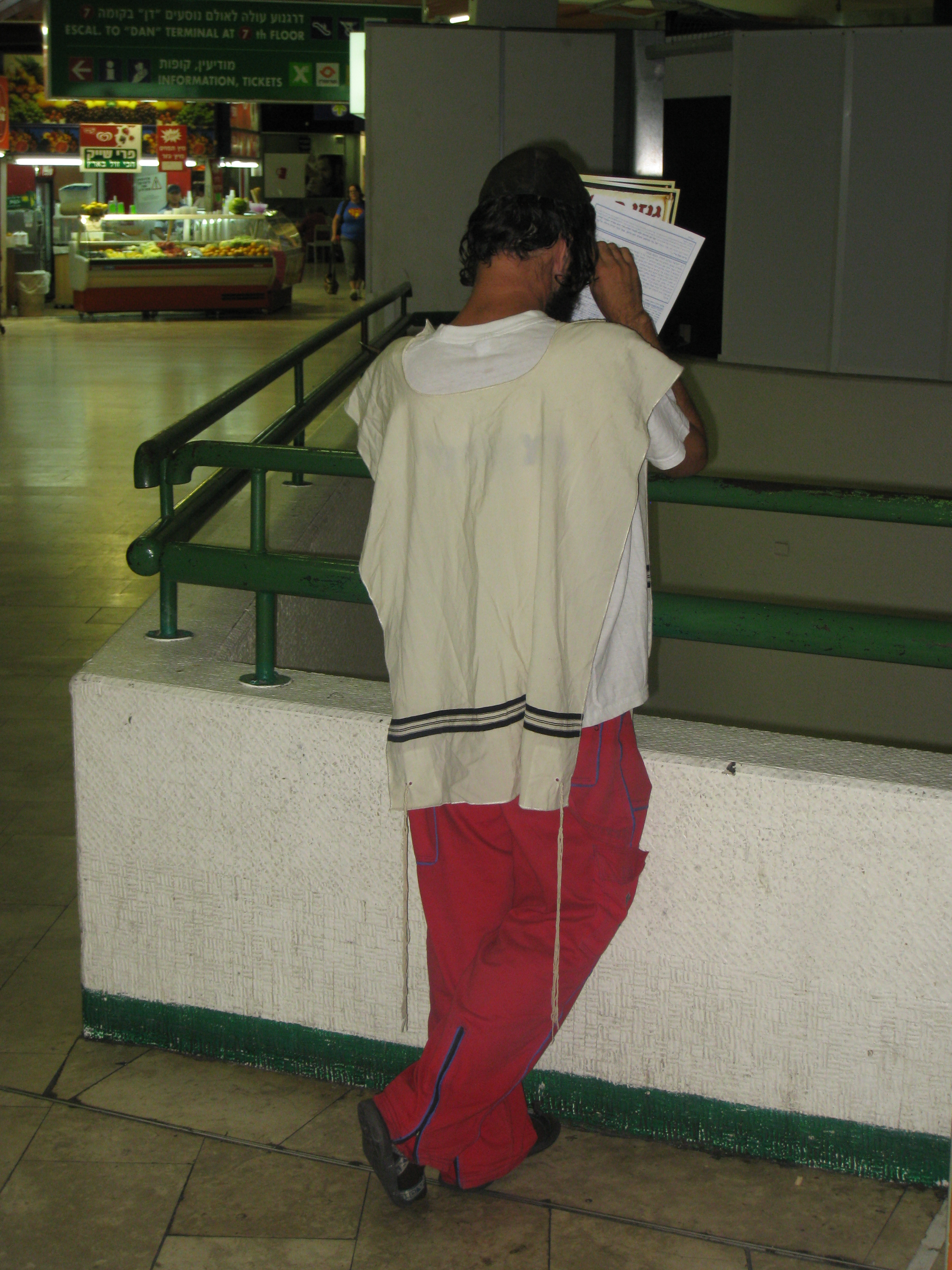 Tel Aviv New Central Bus Station התחנה המרכזית החדשה בתל אביב